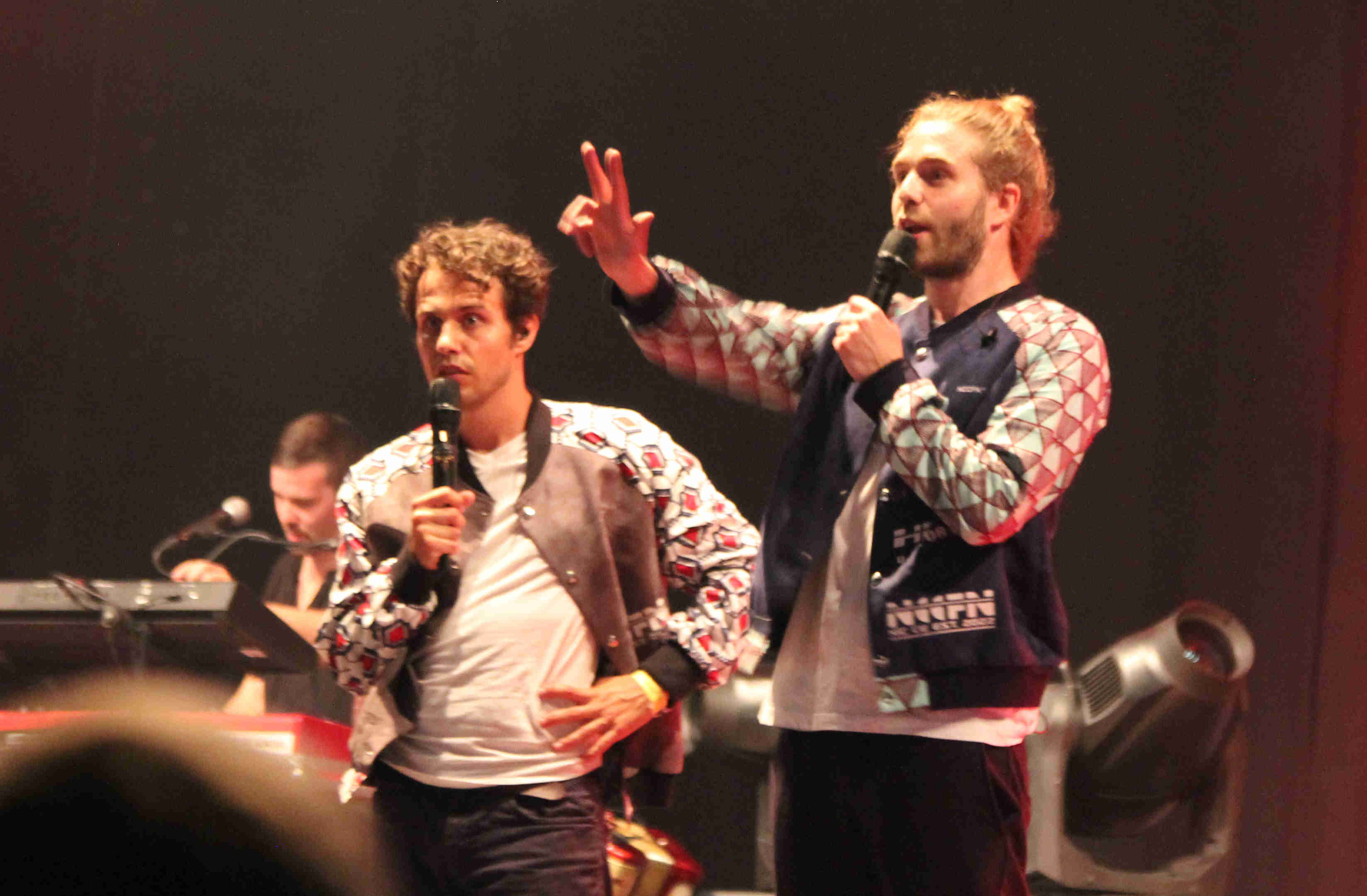 Lo & Leduc beim Bardentreffen in Nürnberg (Hauptmarkt) am 28. Juli 2018